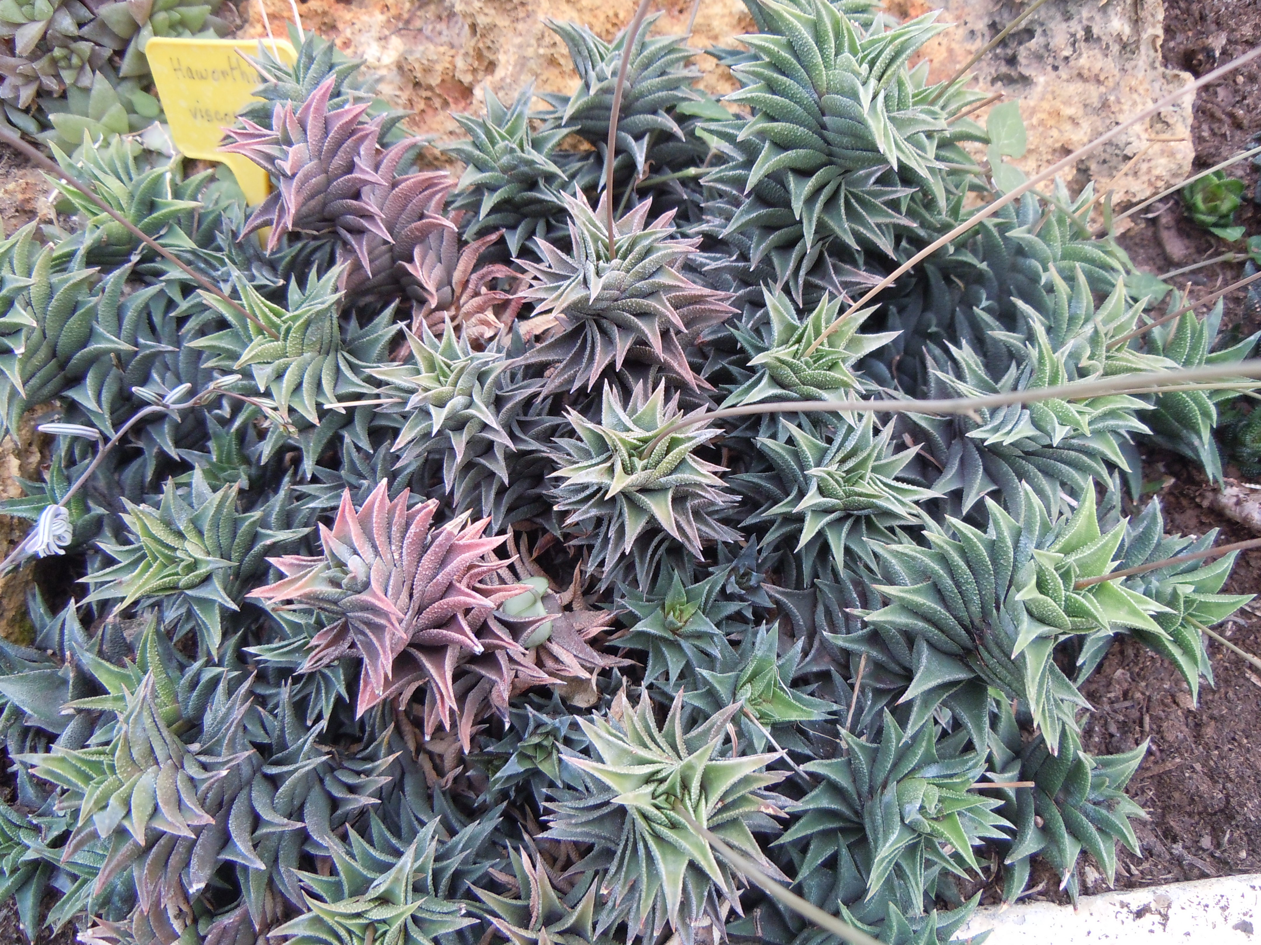 Hybrid Haworthia viscosa - possibly the kewensis hybrid - Serres d'Auteuil